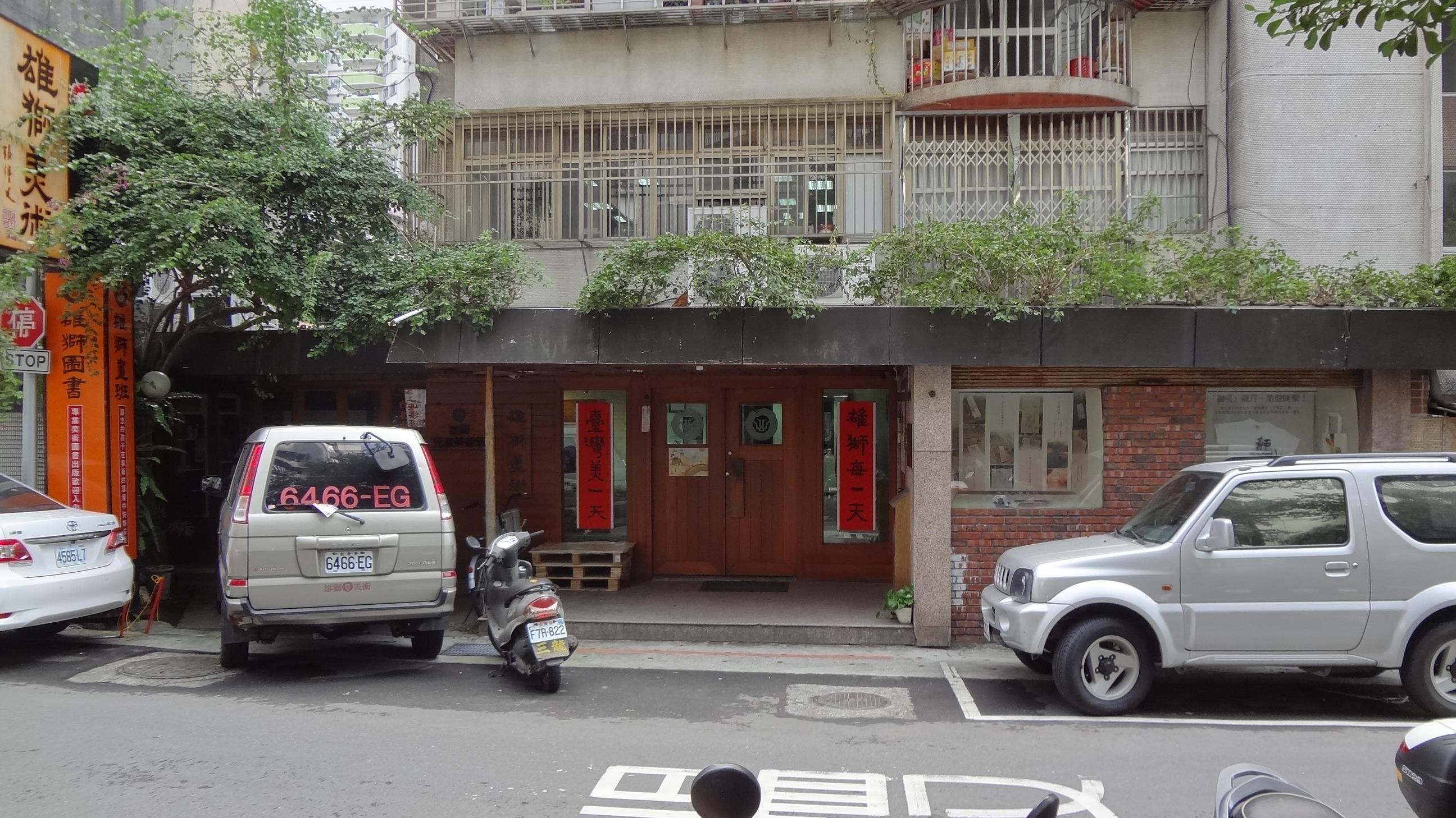 雄獅圖書總部，位於臺北市大安區忠孝東路四段216巷33弄16號。